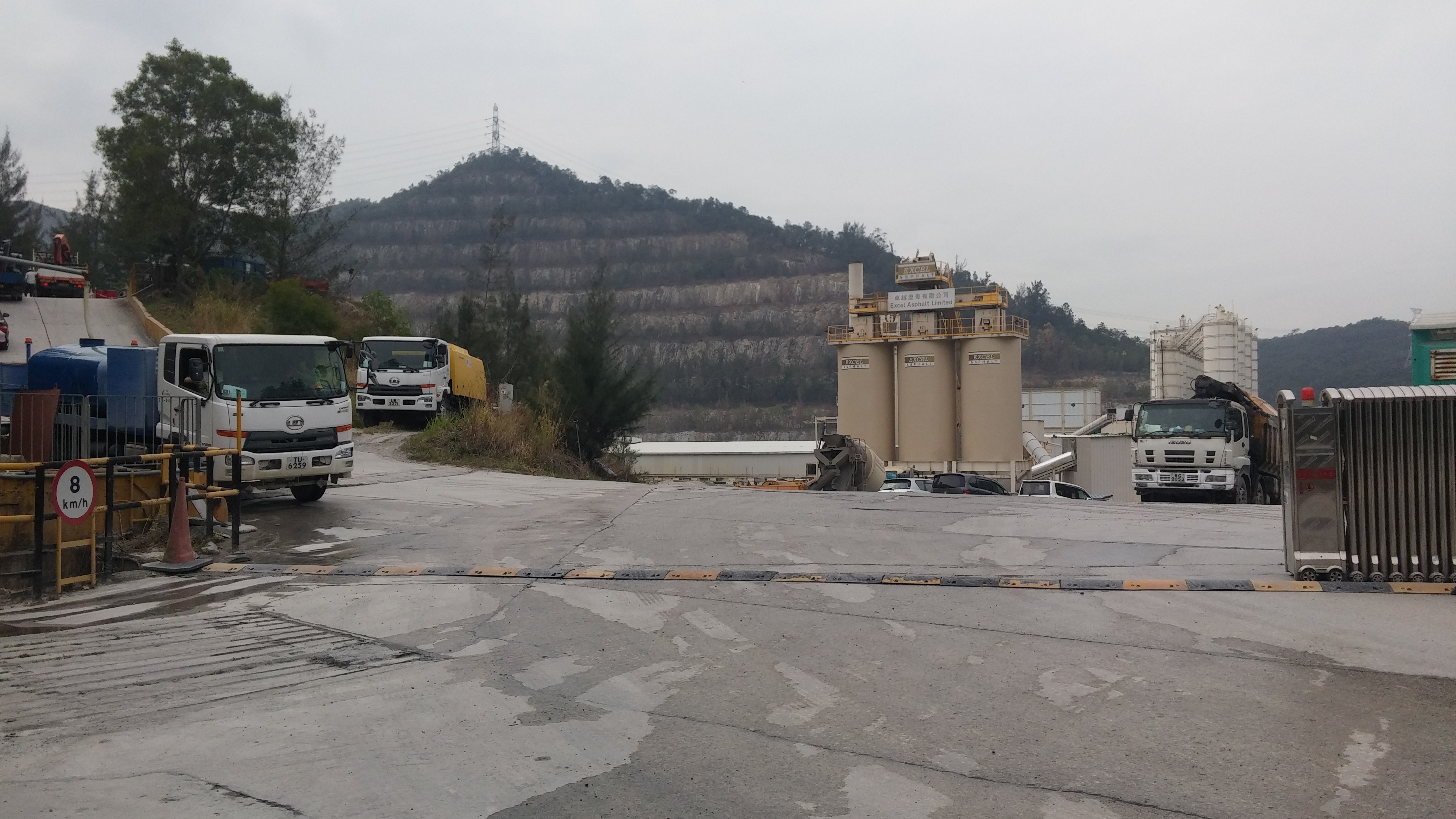 中文（香港）: 藍地石礦埸2018